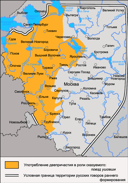 Карта распространения диалектного явления русского языка в области синтаксиса: употребление деепричастия в роли сказуемого: поезд ушовши. Источники: Захарова К. Ф., Орлова В. Г. Диалектное членение русского языка — 2-е изд. — М.: Едиториал УРСС, 2004. — ISBN 5-354-00917-0, с. 84. Язык русской деревни. Диалектологический атлас. — Карта 24. Перфект в русских говорах. Бромлей С. В., Булатова Л. Н., Захарова К. Ф. и др. Русская диалектология / Под ред. Л. Л. Касаткина — 2-е изд., перераб. — М.: Просвещение, 1989. — ISBN 5-09-000870-1, с. 131